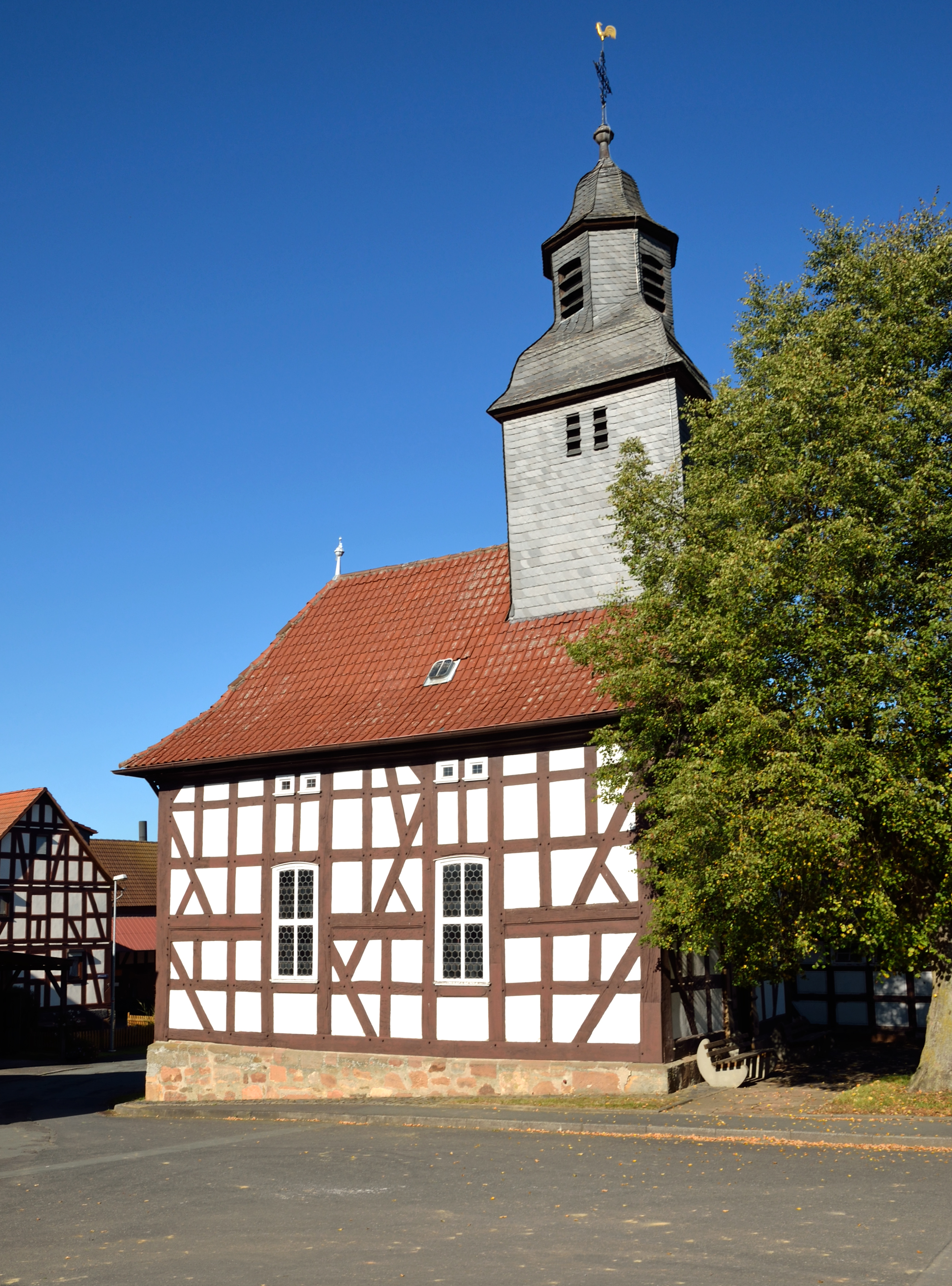 Evangelische Kirche Allna